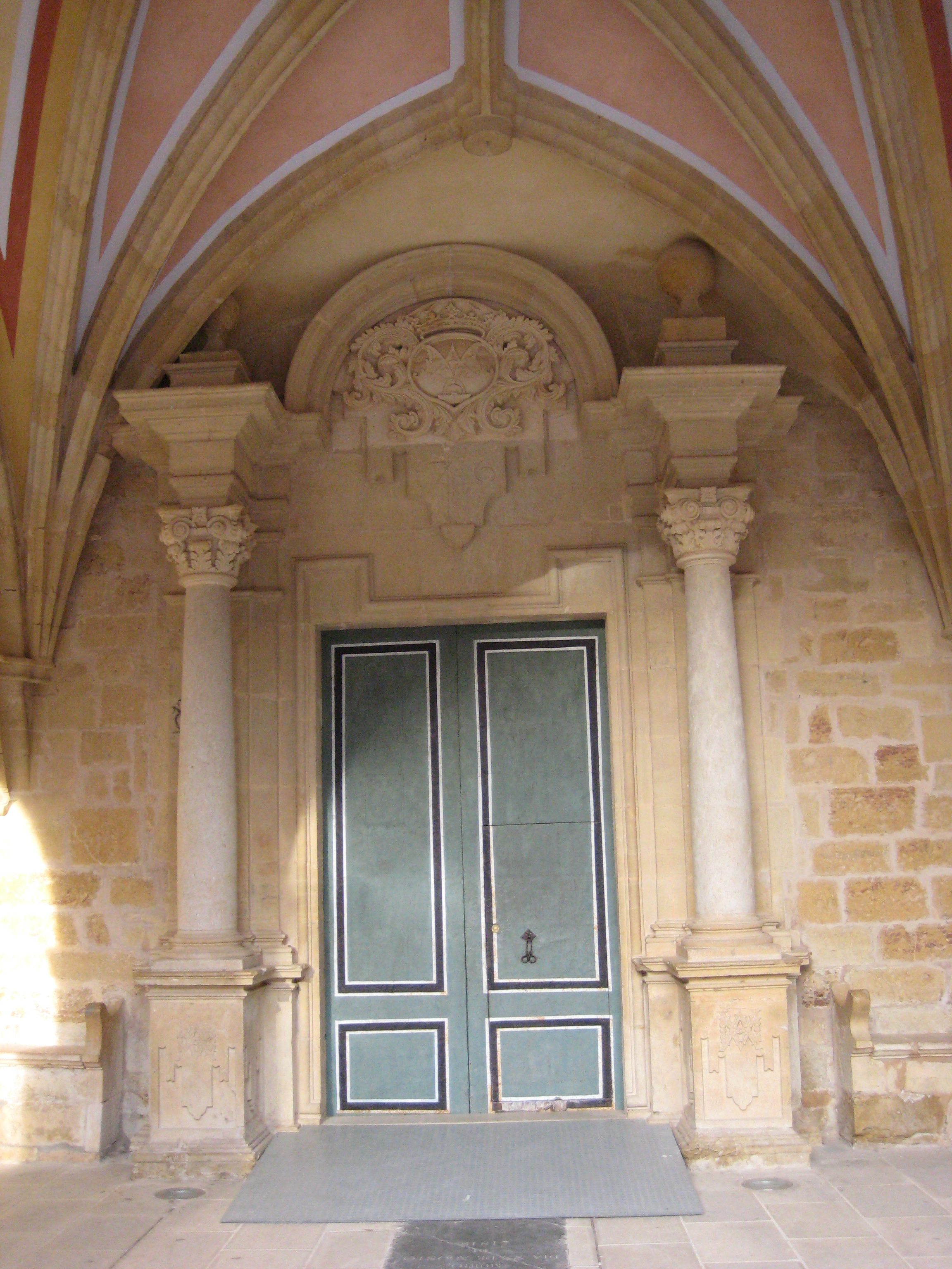 Portada principal del Reial Santuari de la Mare de Déu de la Font de la Salut de Traiguera (Baix Maestrat)